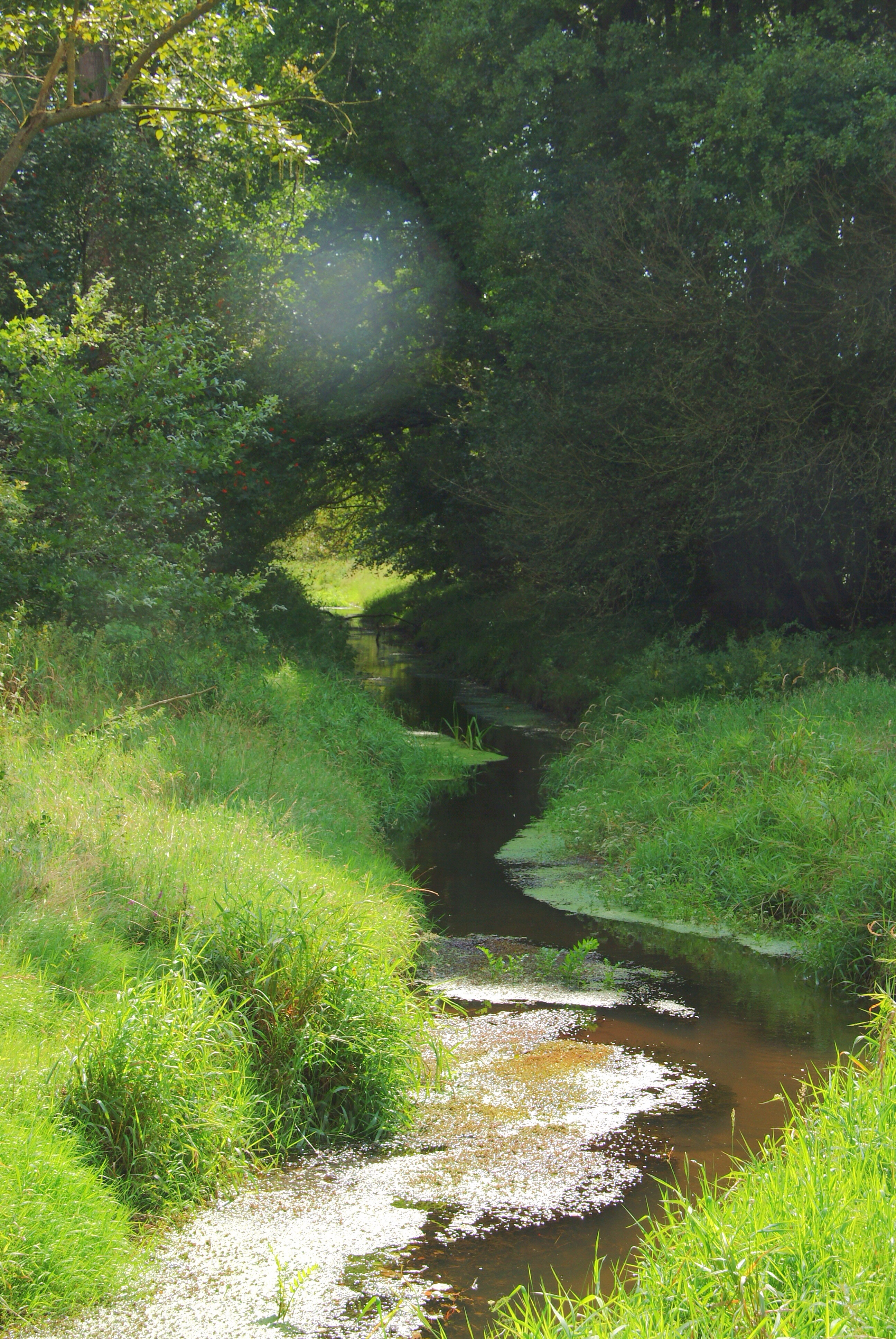 Foto der Schwienau (Fluss) vor Bode im Landkreis Uelzen